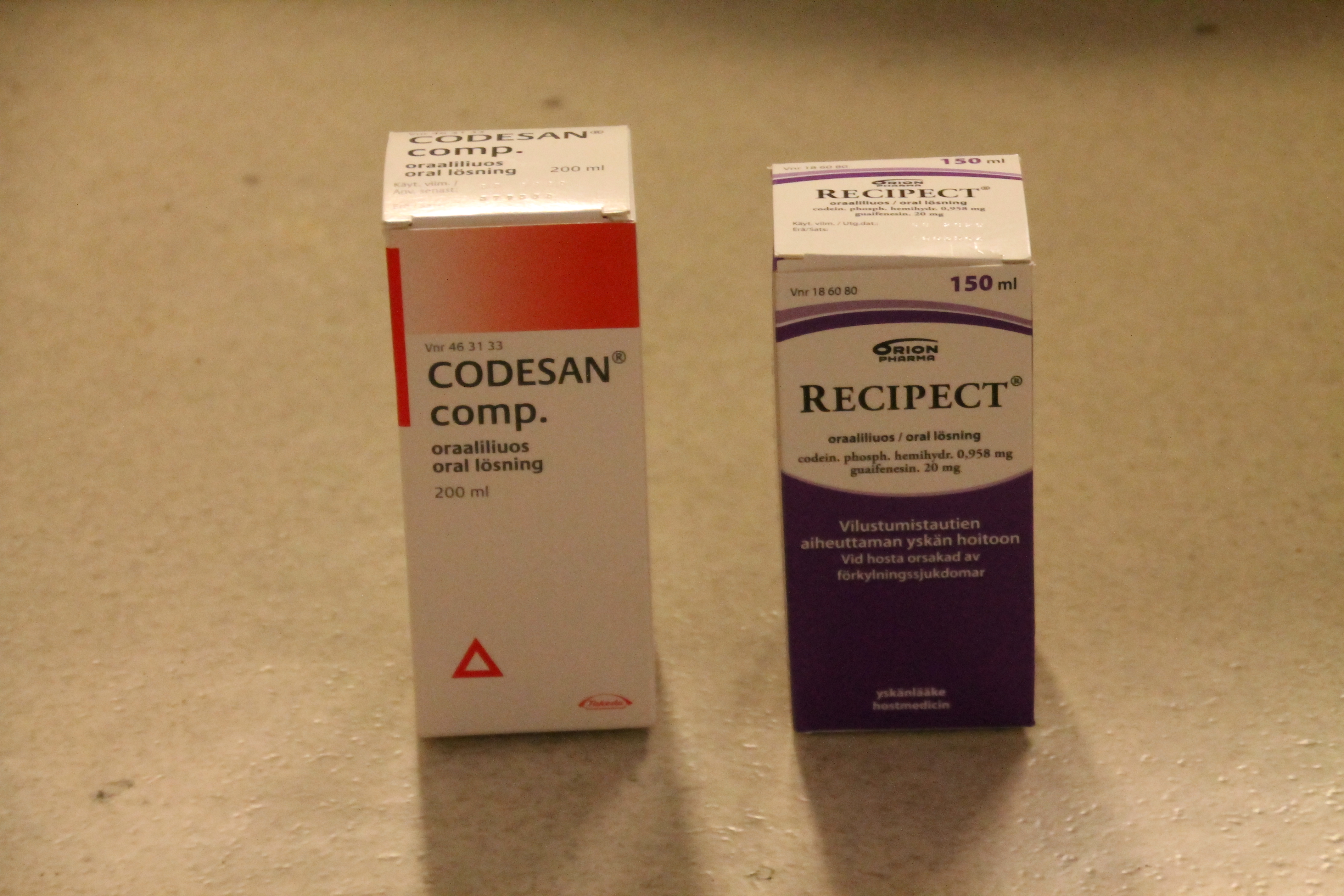 Suomessa myytäviä yskänlääkkeitä.